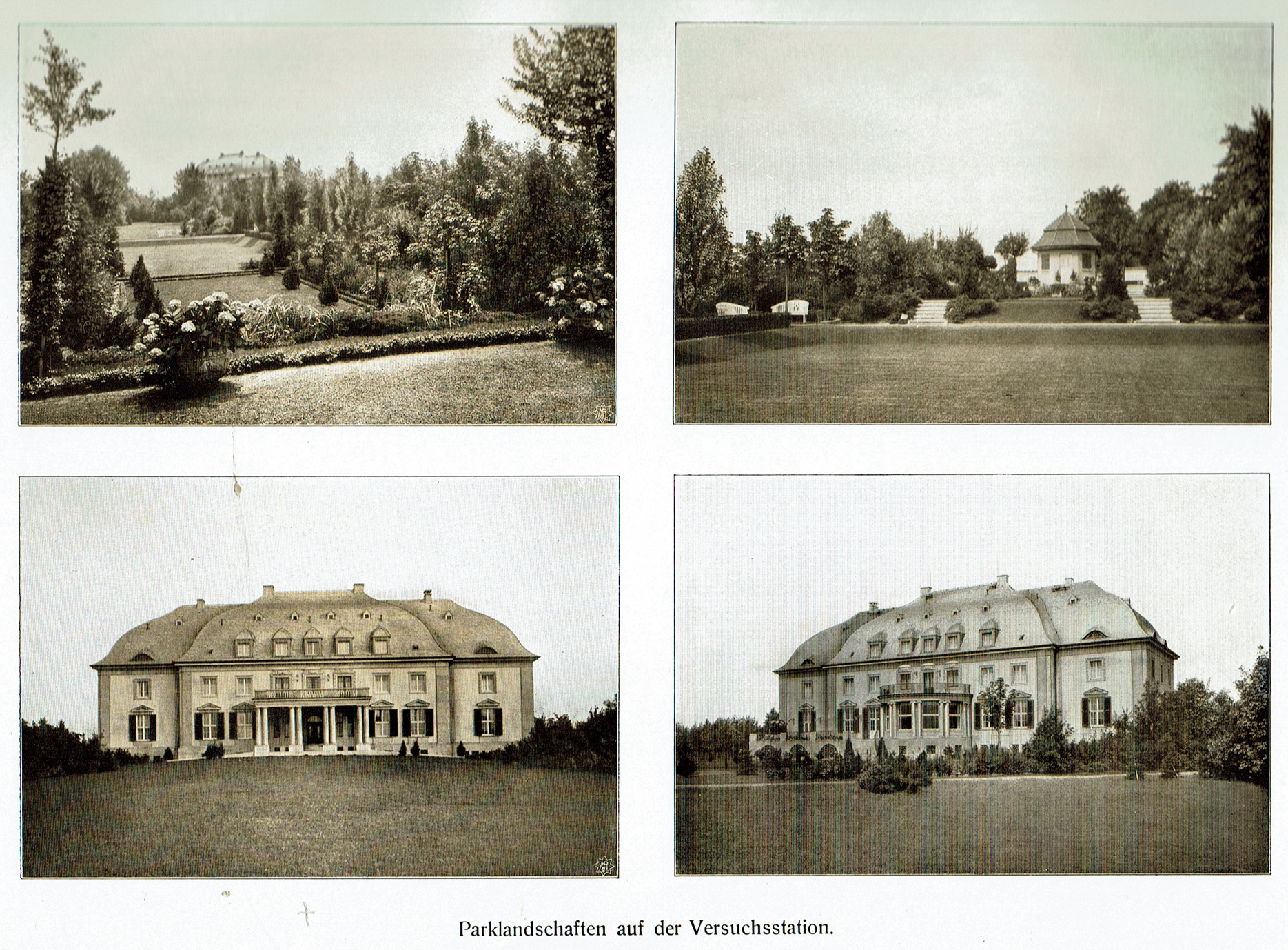 Rud. Sack. Leipzig-Plagwitz. 1863–1913. Lebensgeschichte des Begründers, Entwicklung und Stand des Werkes. Meisenbach Riffarth & Co., Leipzig 1913.